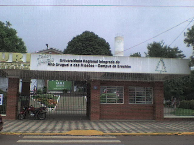 Universidade Regional Integrada, Erechim.